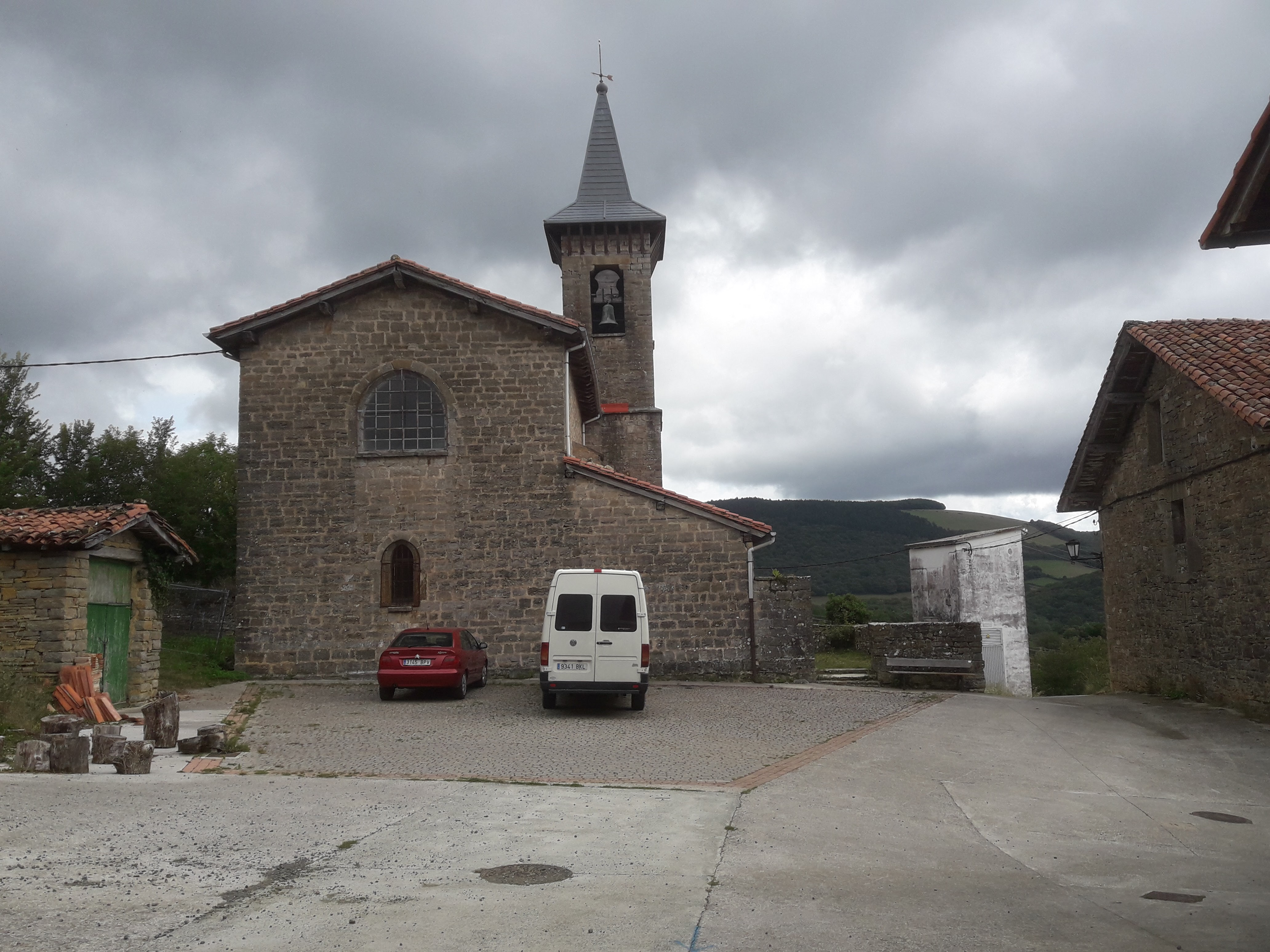 Església de Beramendi